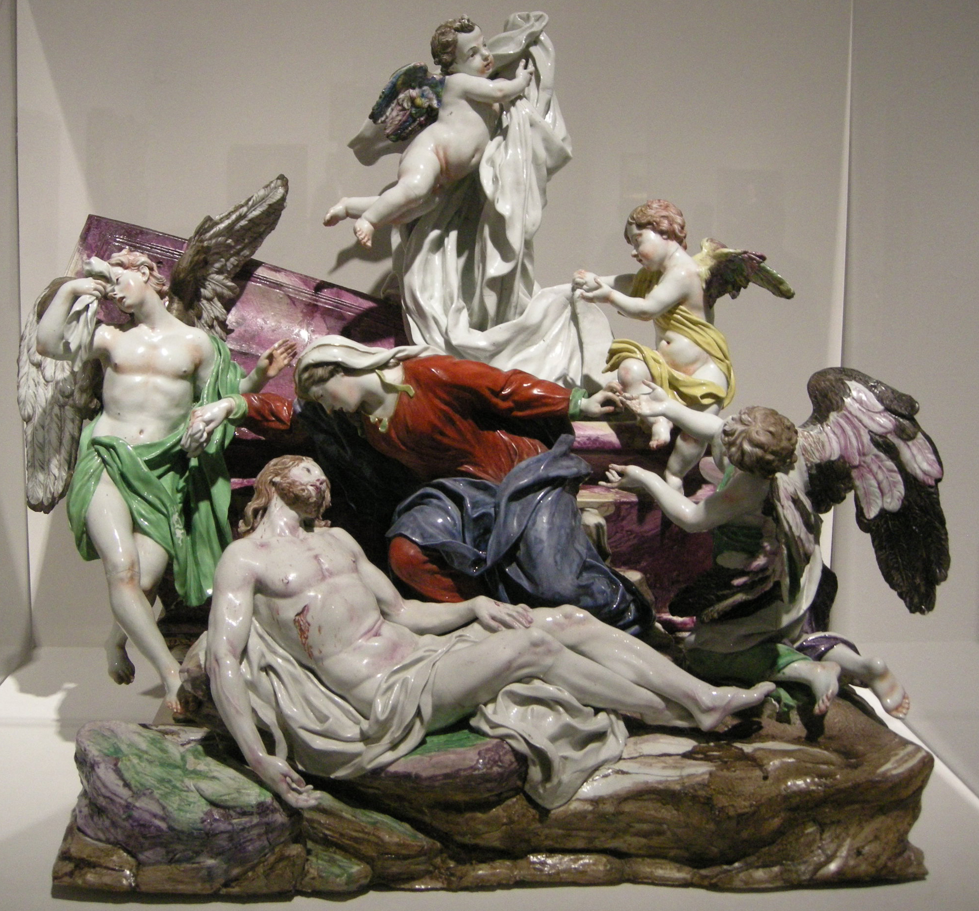 Massimiliano soldani benzi, manifattura di doccia, pietà, 1745 ca. su un modello del 1711-13 ca.